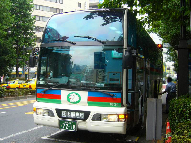 登録番号 練馬22か72-18 西武バス練馬営業所所属 車番1824 夜行用車両 （各系統で共通運用） 2007年9月1日 池袋駅東口にて撮影